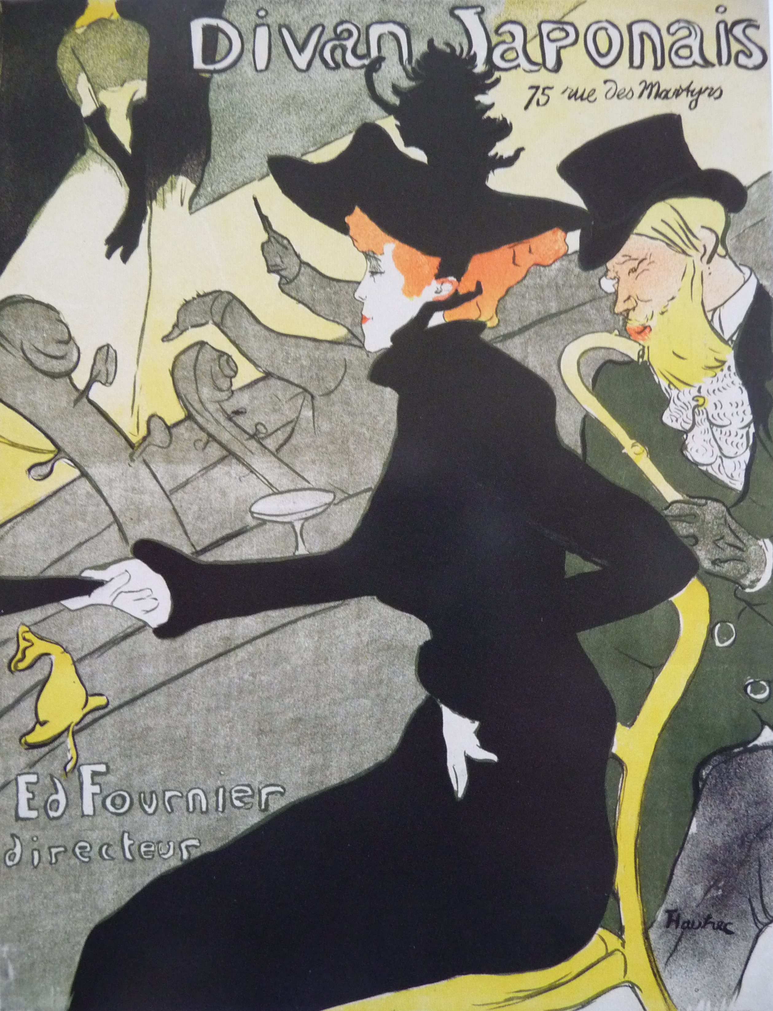 Farblithographie von Henri de Toulouse-Lautrec